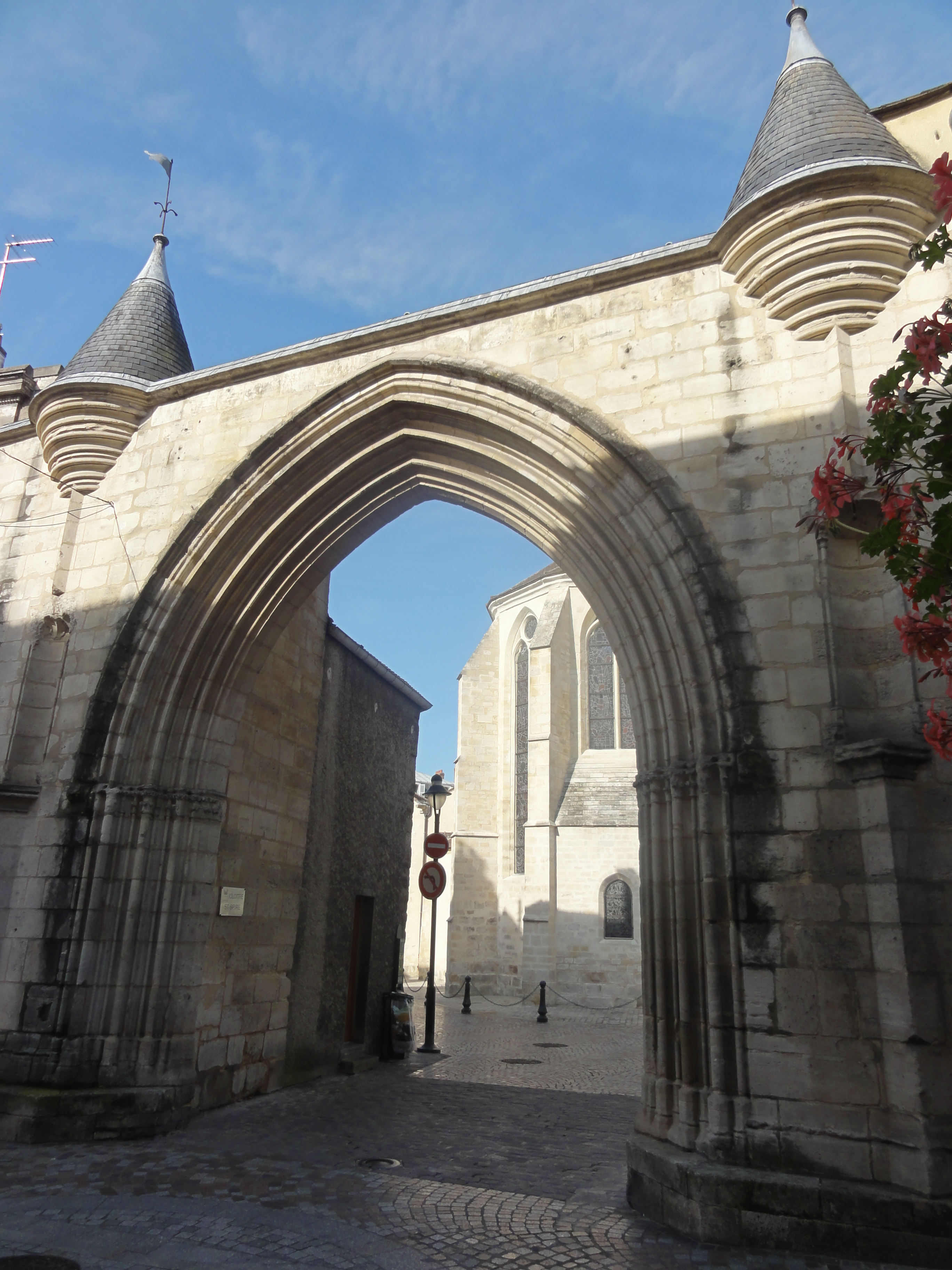 Portail de l'ancien enclos du chapitre, rue Saint-Spire / cloître Saint-Spire.